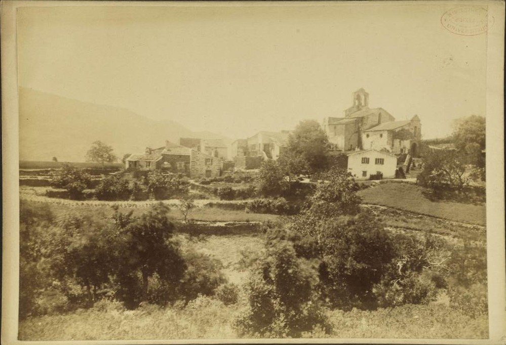 Vue générale de Casefabre vers 1885